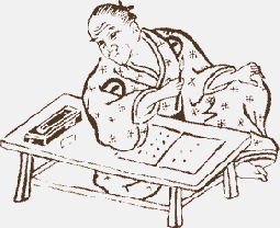 Chikamatsu Monzaemon by Hozumi Ikan